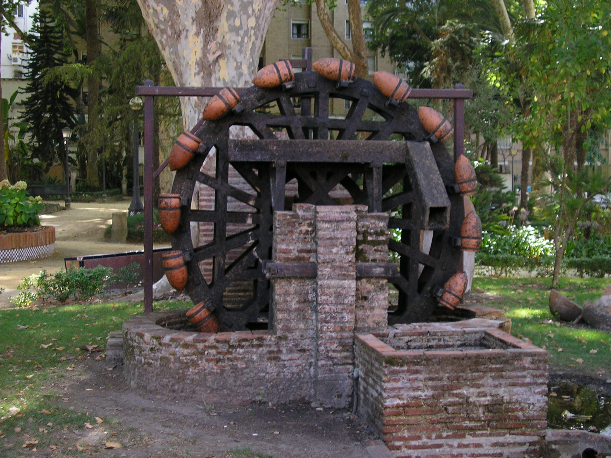 Parque Maria Cristina. Imagen de la noria islámica situada en el interior del parque Maria Cristina de Algeciras. Fotografia realizada para Wikimedia en agosto de 2007